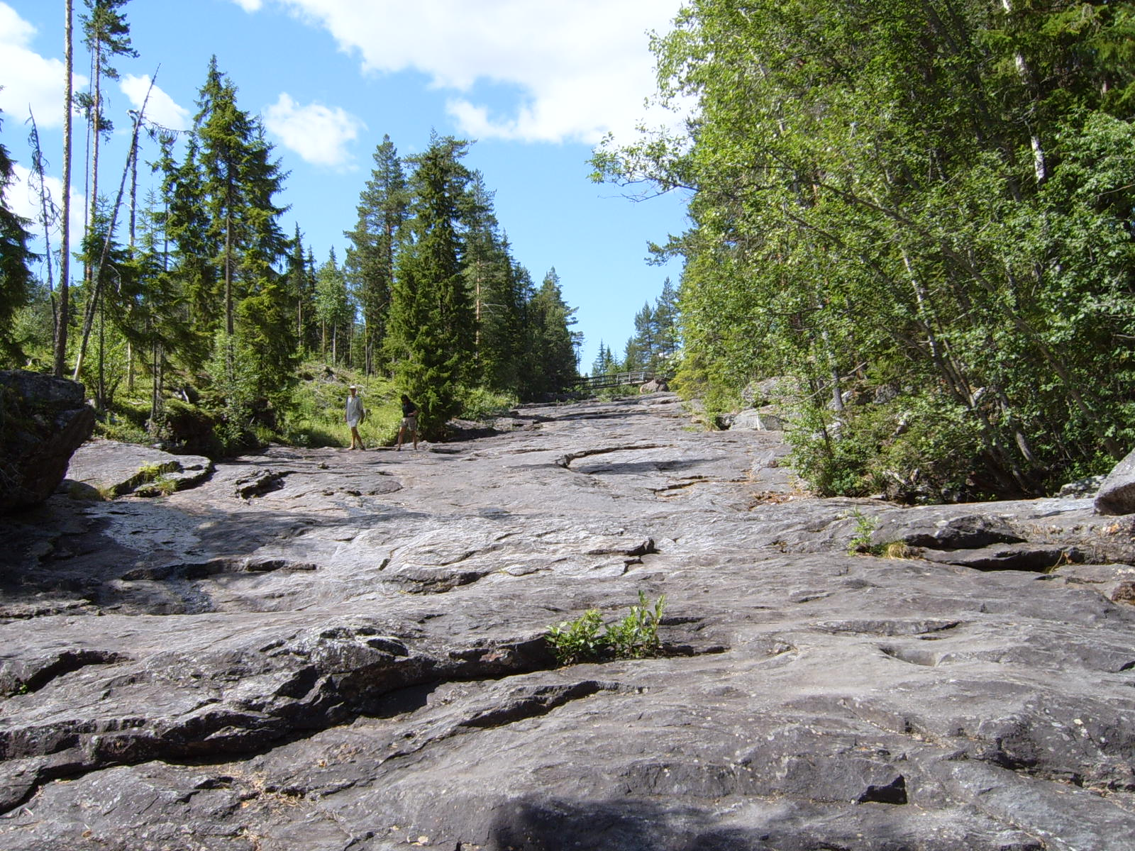 The river ont the dome at the center of the crater of Gardnos. Personal picture, july 2005, I set it in public domain.